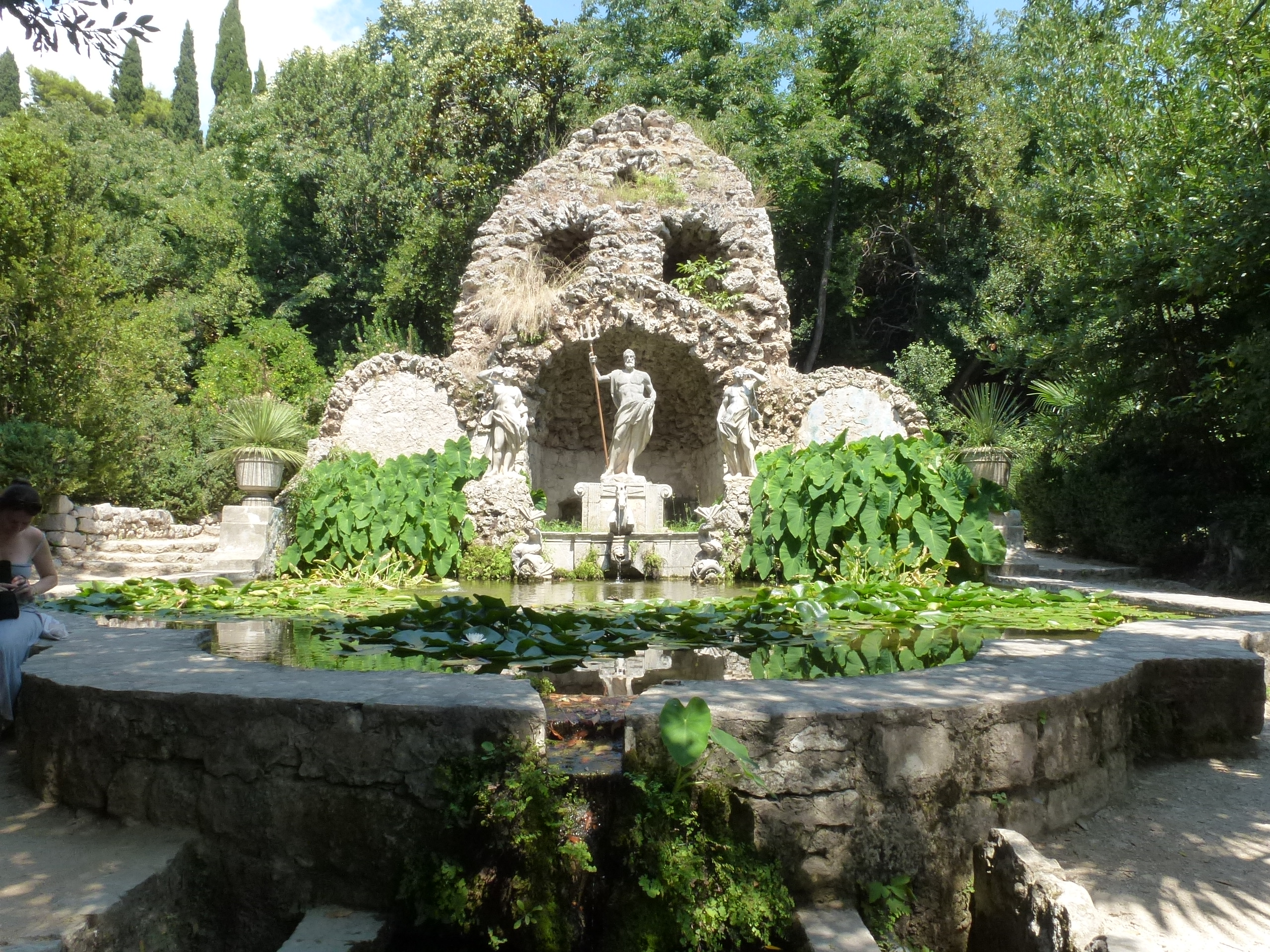 Trsteno Arboretum fountain